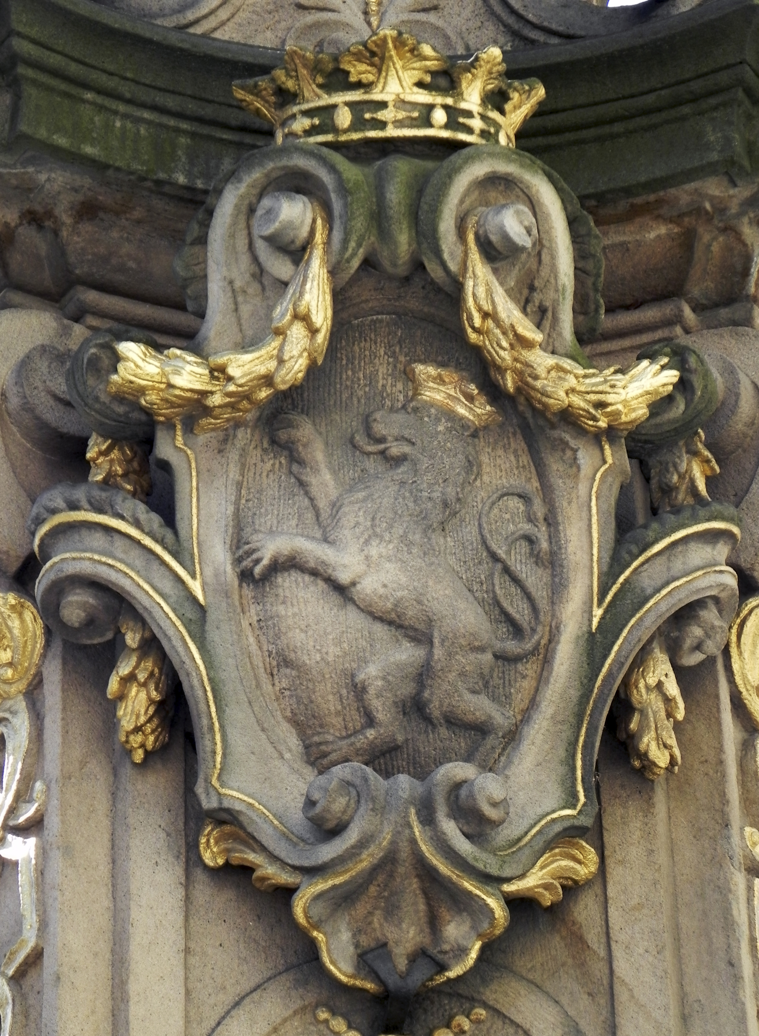 Bystrzyca Kłodzka, kościół par. p.w. św. Michała Archanioła, kon. XIII, XV, 1914